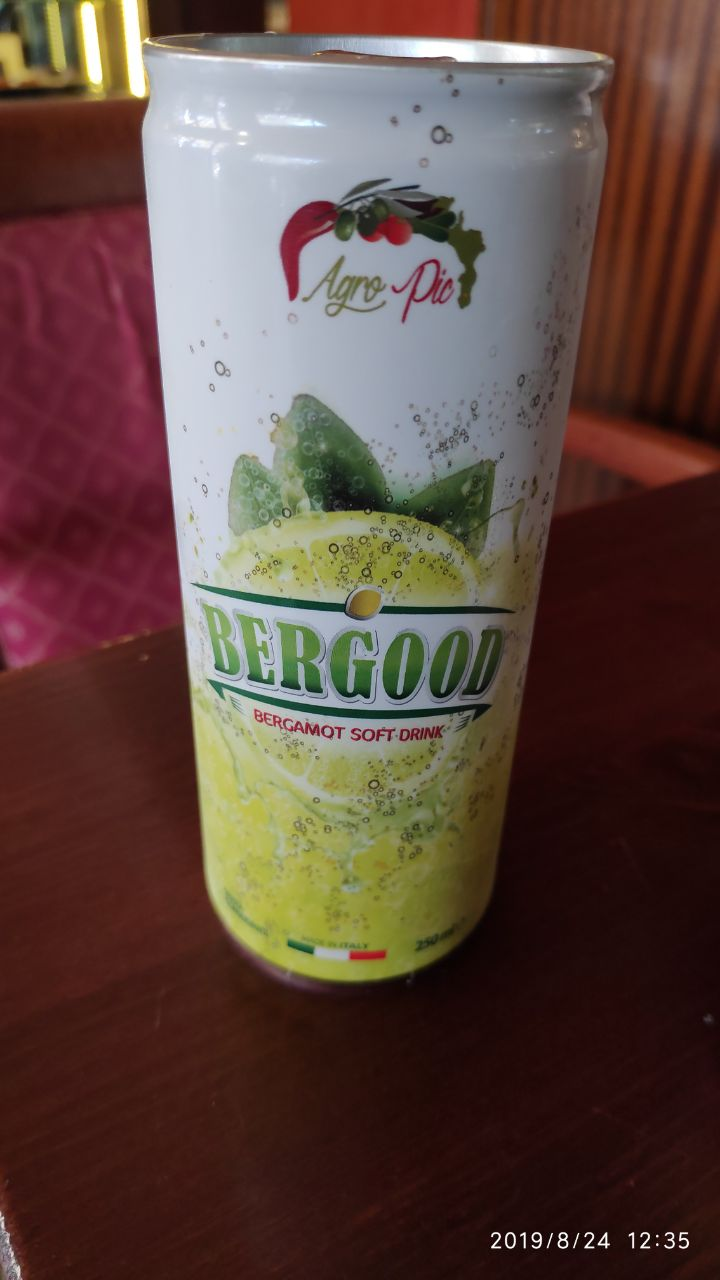 Bergood (2019)